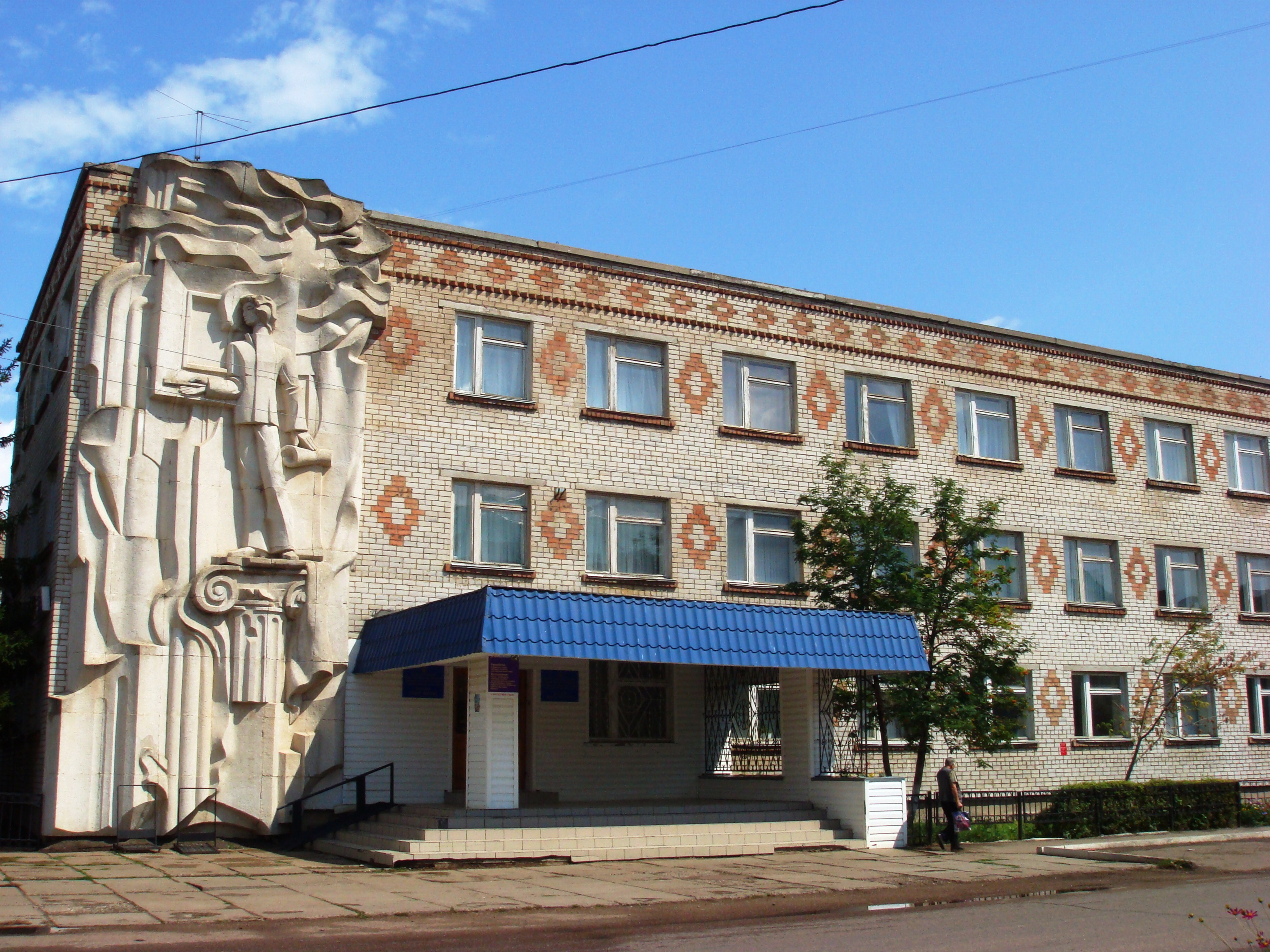 Детская школа искусств в городе Ишимбае. Вид с улицы Стахановской